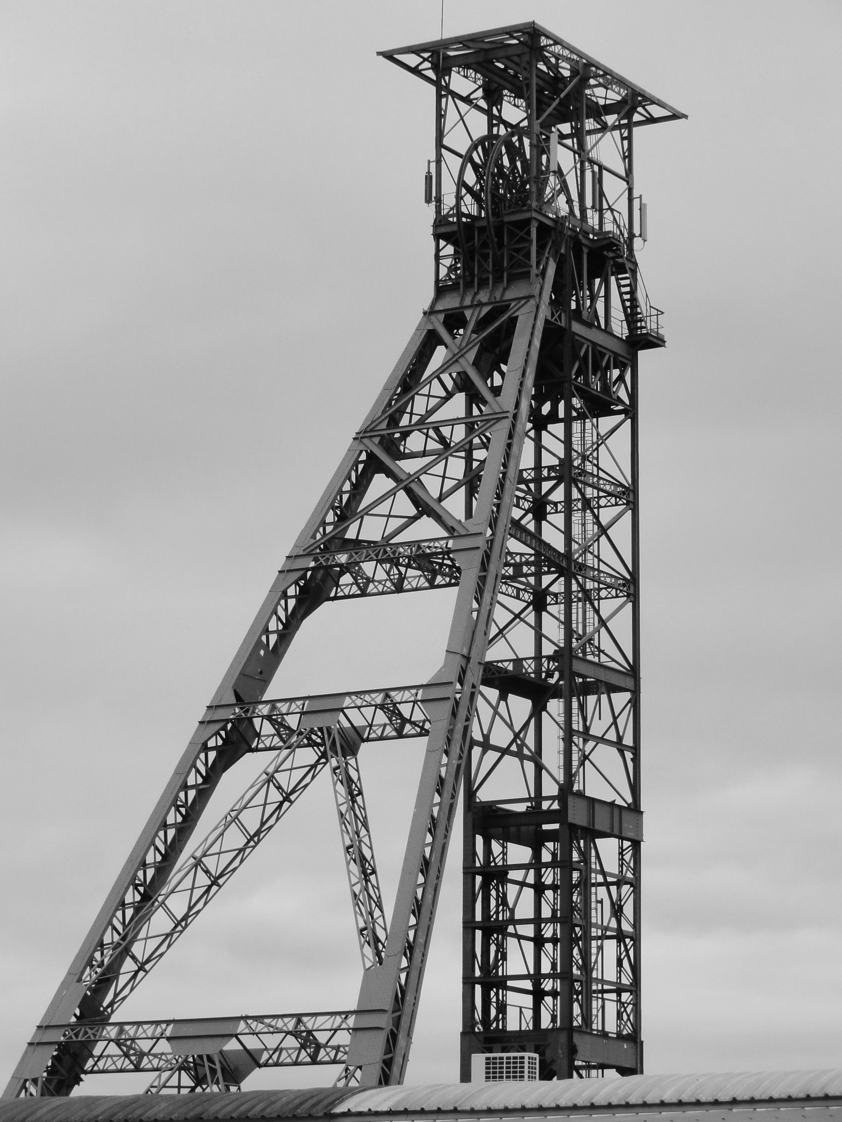 La fosse n° 1 - 1 bis - 1 ter de la Compagnie des mines de Liévin était un charbonnage du bassin minier du Nord-Pas-de-Calais constitué de trois puits situé à Liévin, Pas-de-Calais, Nord-Pas-de-Calais, France. .